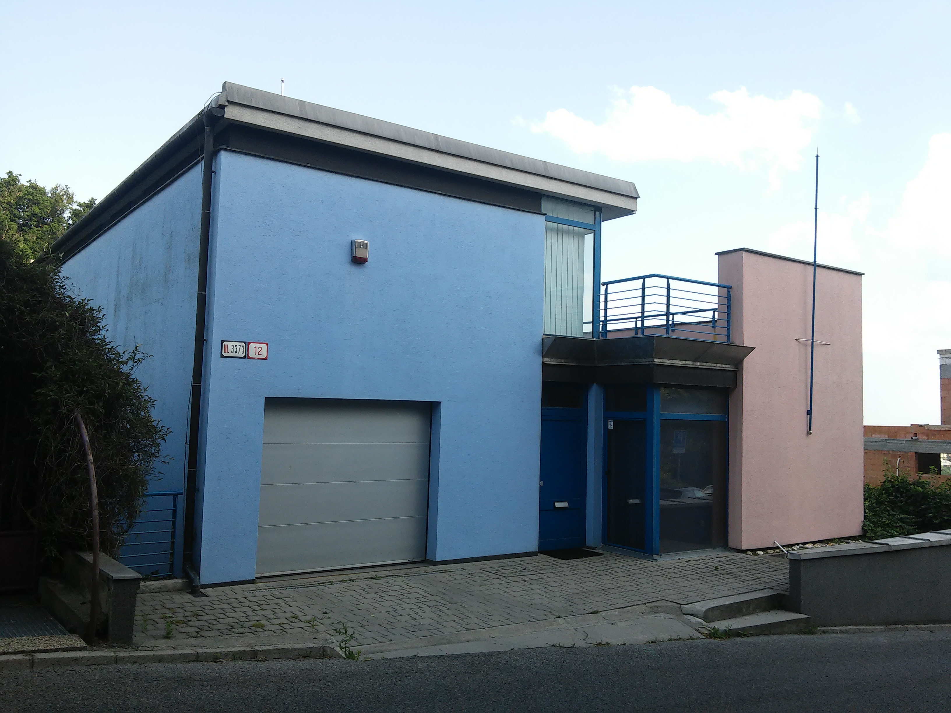 Guothova, Nové Mesto, Bratislava